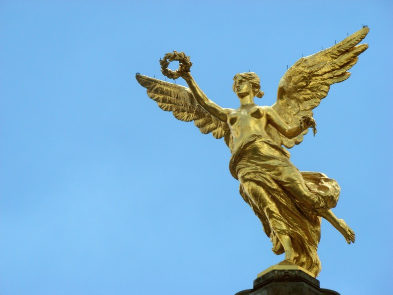 Angel sobre fondo cian